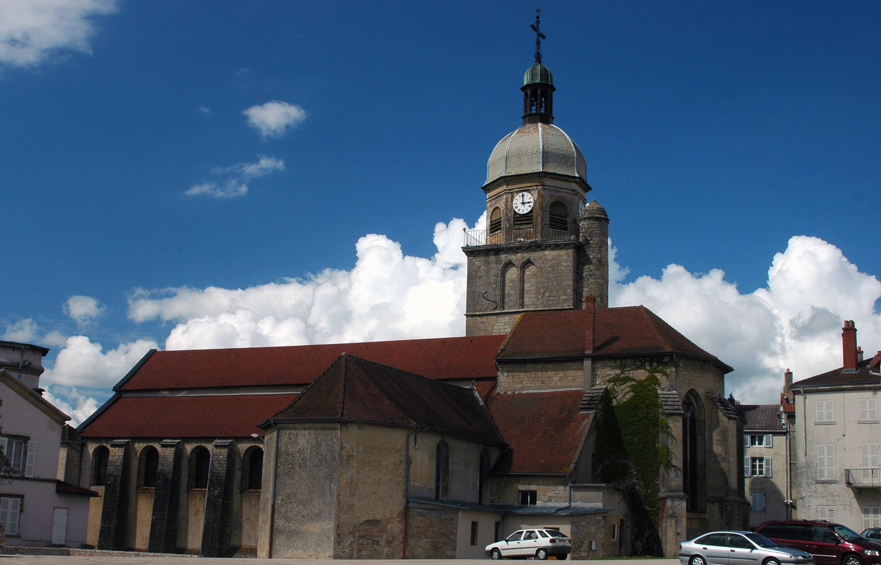 Eglise de Saint-Amour (Jura)